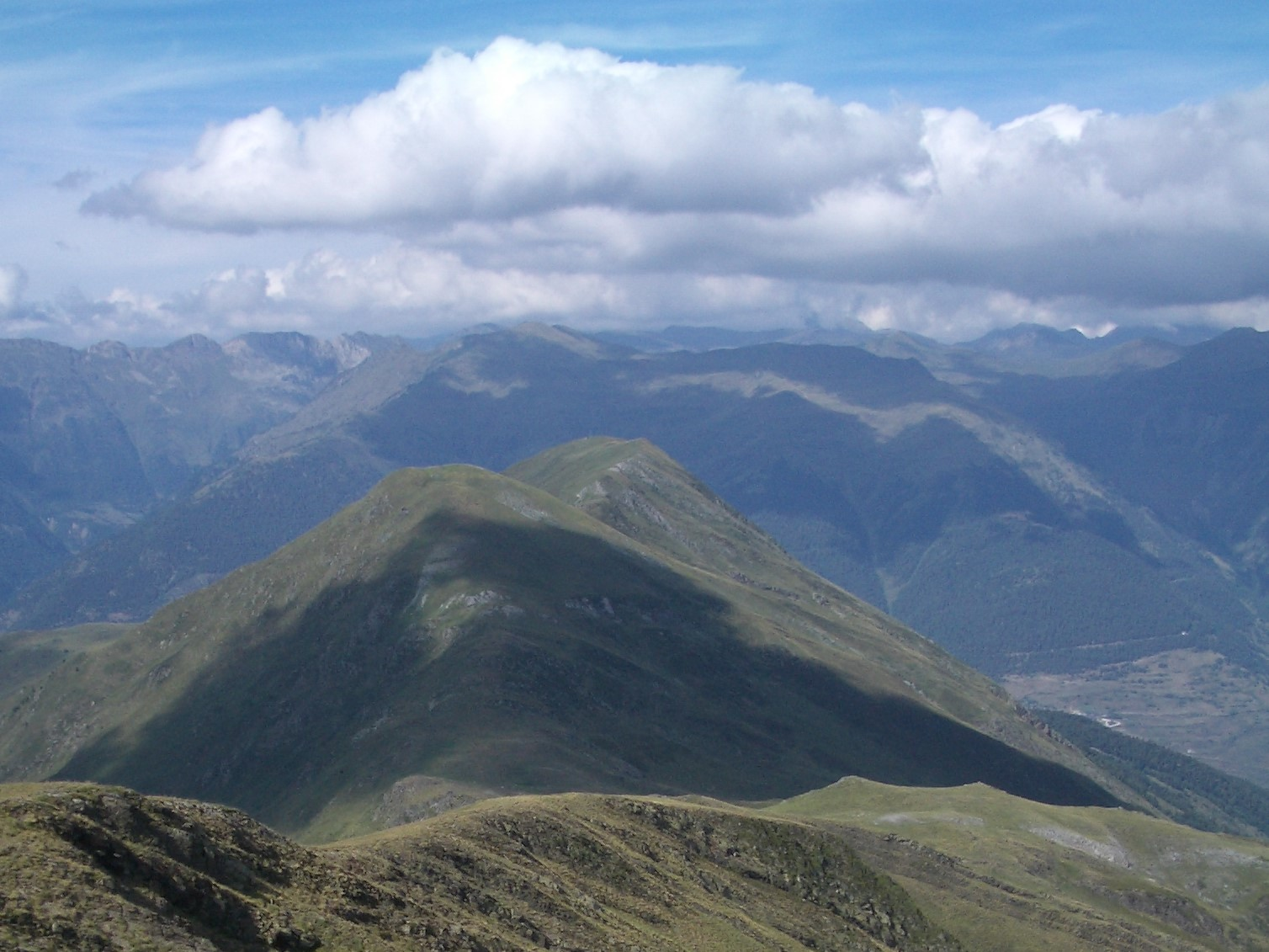 Vista del Tuc de Letassi y Tuc de Montcorbison desde el Tuc de Montpius